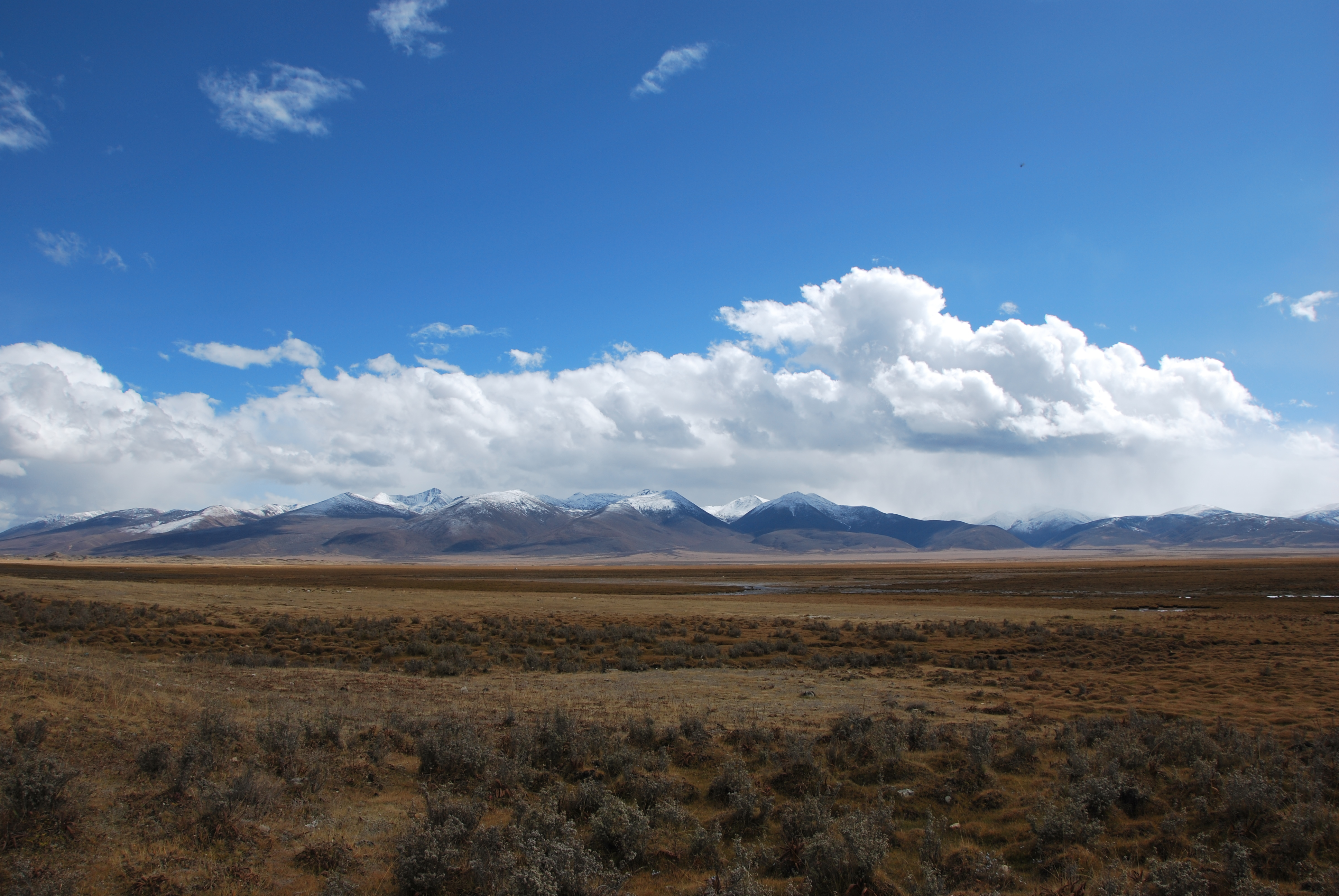 318国道 甘孜藏族自治州理塘县